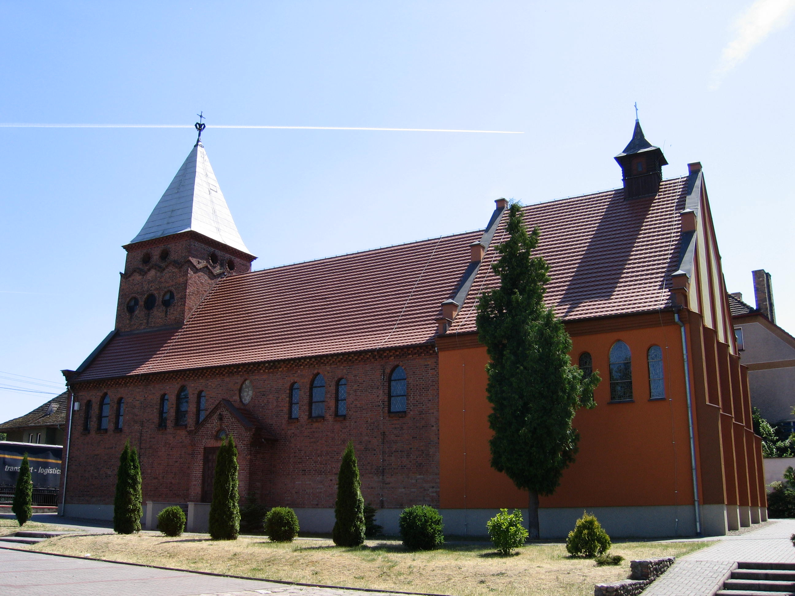 kościół św. Bonifacego /otoczenie/ Barlinek